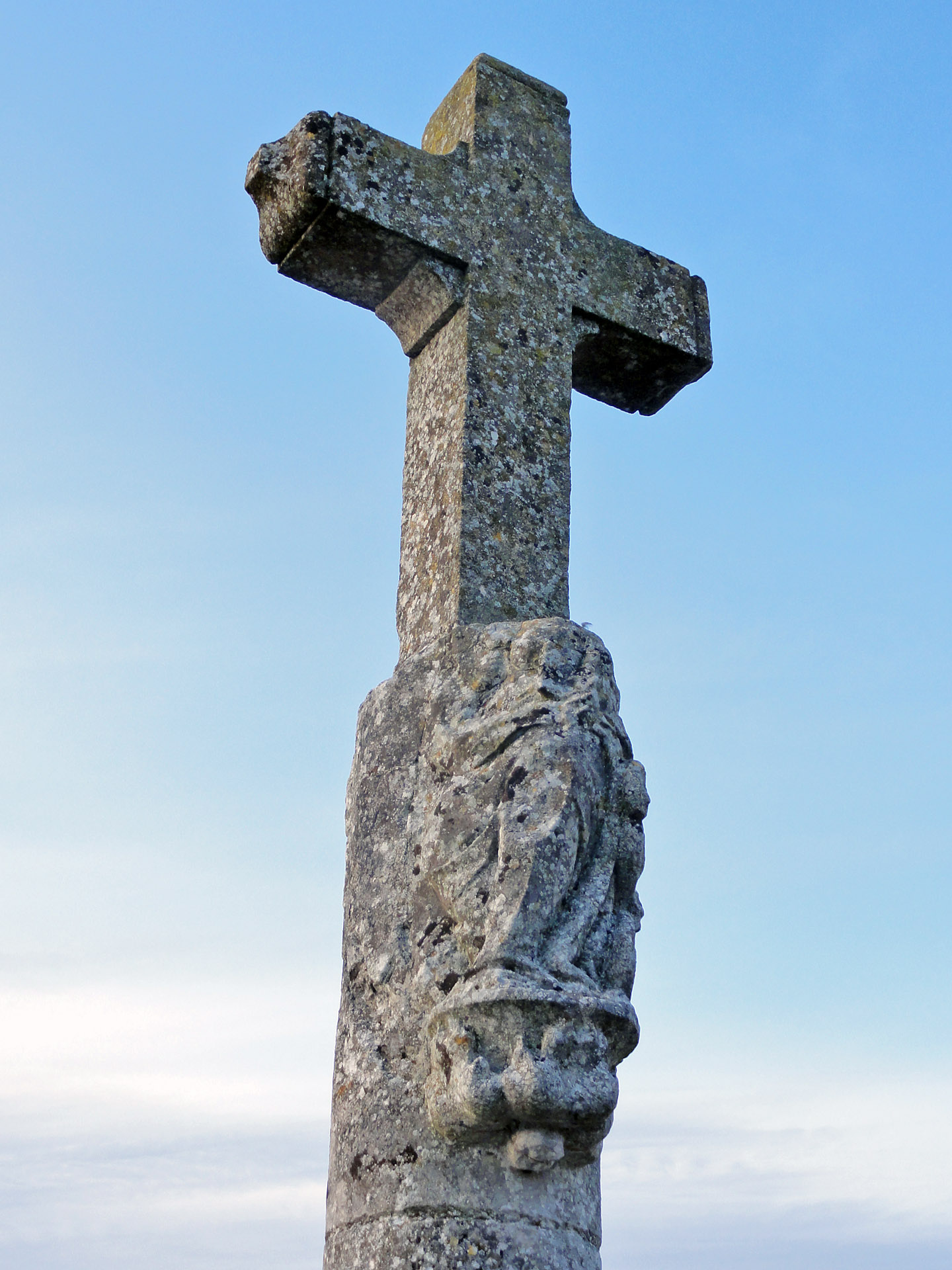 Calvaire du cimetière de Chérence, Val-d'Oise, France.